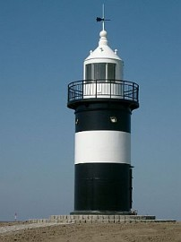 Leuchtturm "Kleiner Preuße" in Wremen